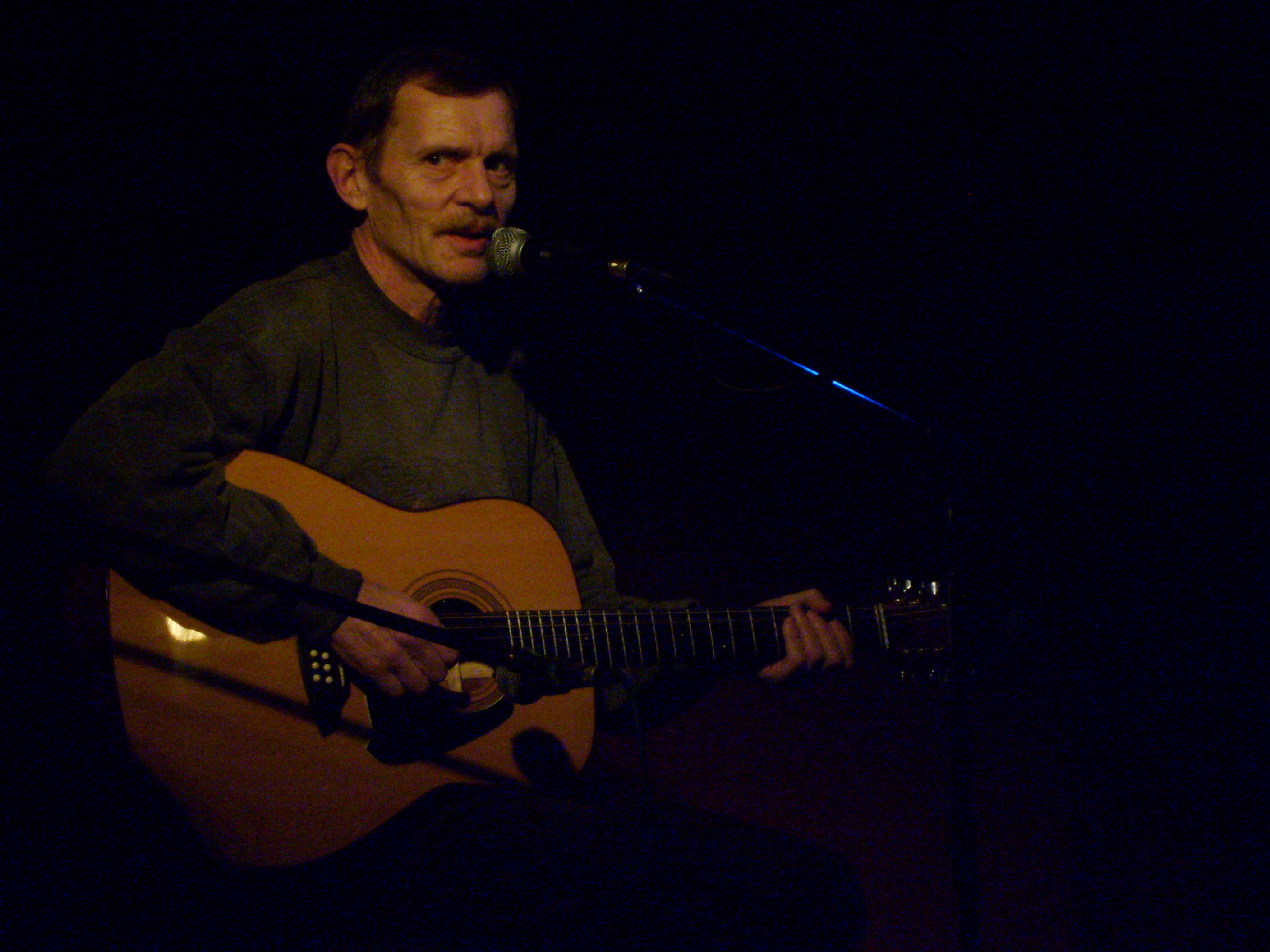 Jiří Schmitzer, český herec a písničkář, koncert v klubu Solnice, České Budějovice, Czech Republic